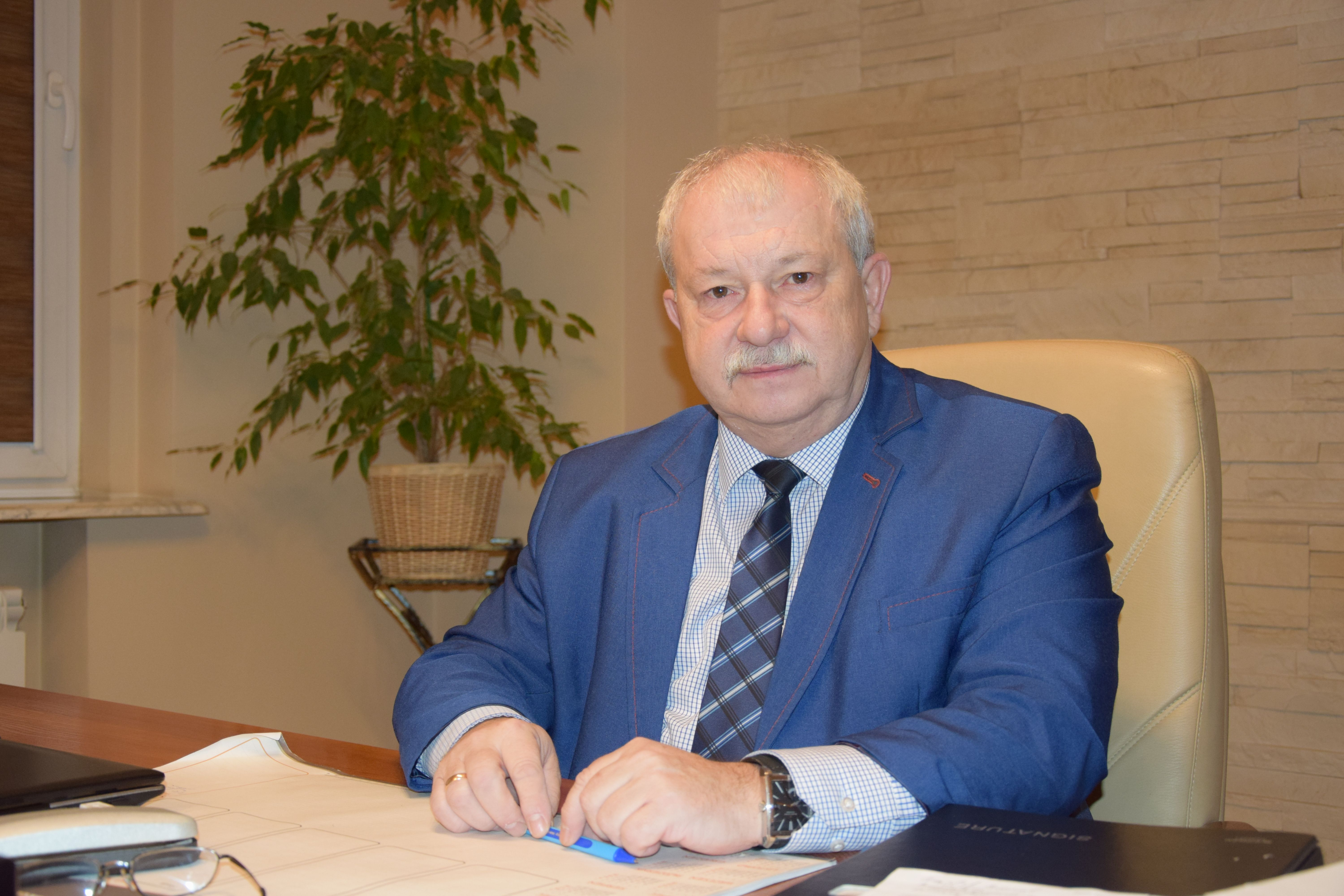 Starosta Nowotomyski Andrzej Wilkonski